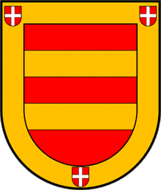 Escudo de los Vich, extinguida familia nobiliaria valenciana del Renacimiento.